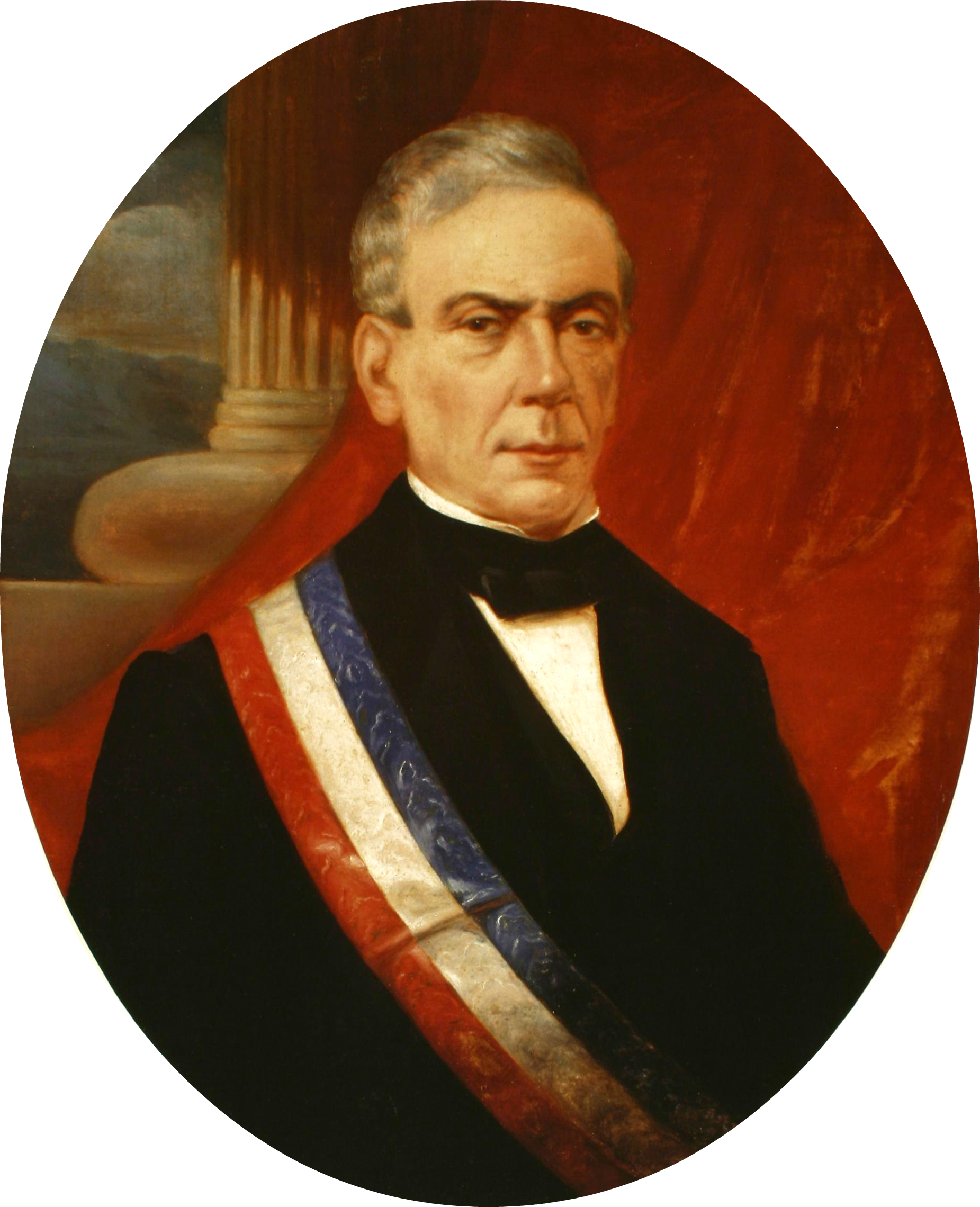 Retrato de José Joaquín Pérez, Presidente de Chile (1861-1871)